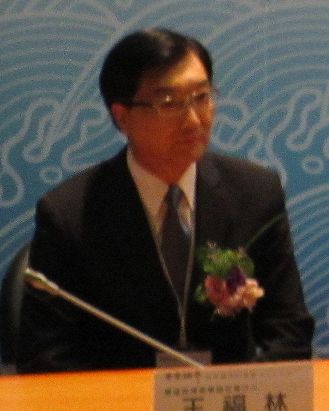 中文（台灣）: 黃金十年兩岸關係研討會